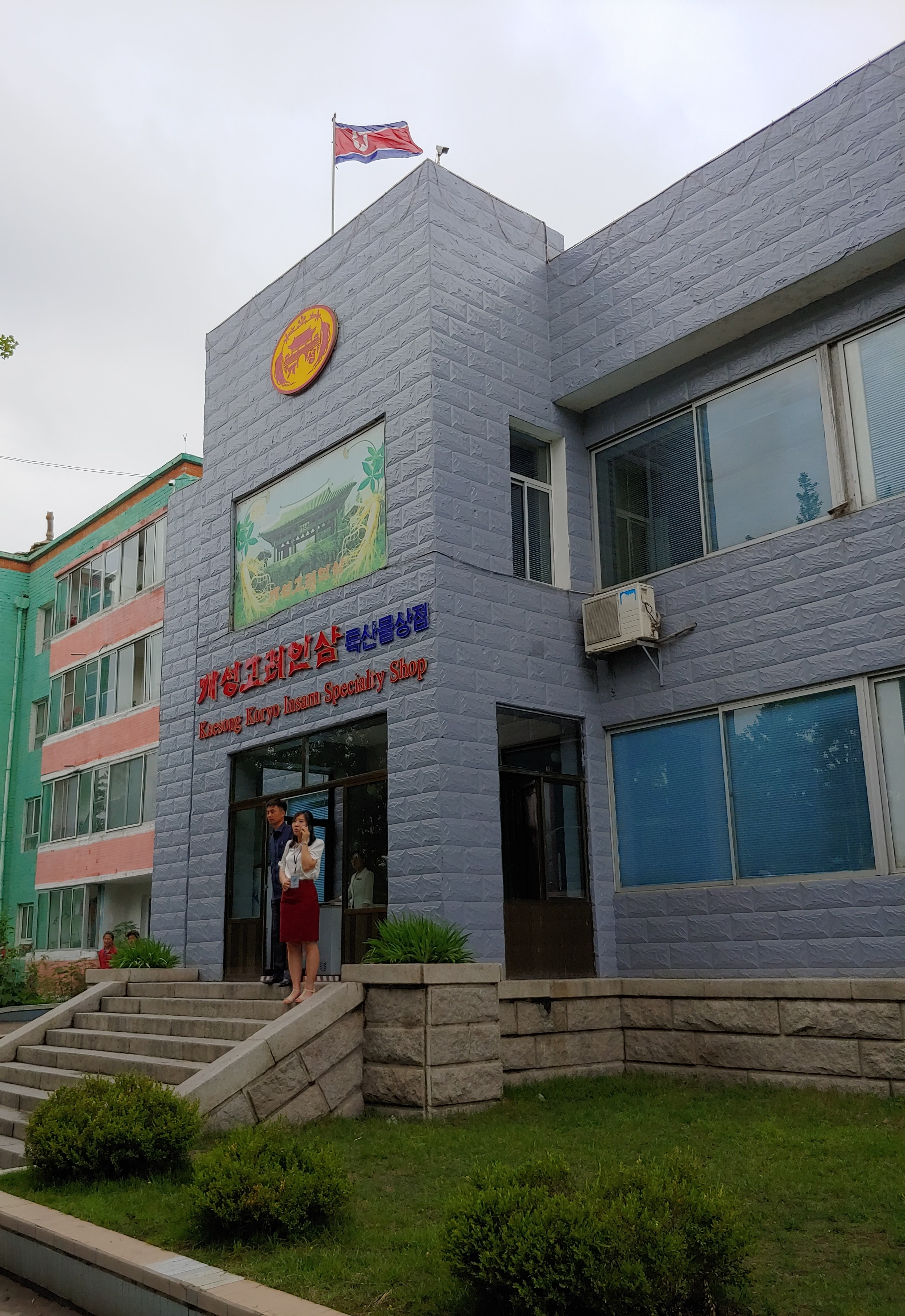 Restaurant situé à Kaesong qui appartient à la Korea International Travel Company